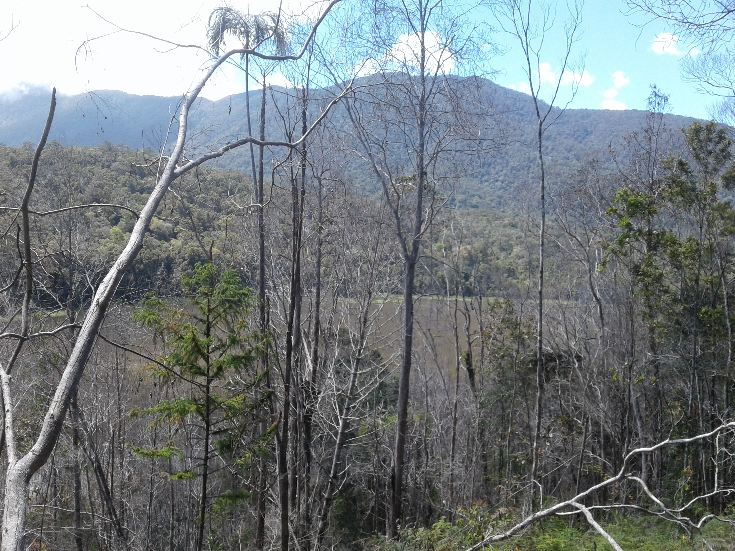 Telaga Oroli di Cagar Alam Cyclops, utara kampung Nolokla, Distrik Sentani Timur, Kabupaten Jayapura, Provinsi Papua, Indonesia